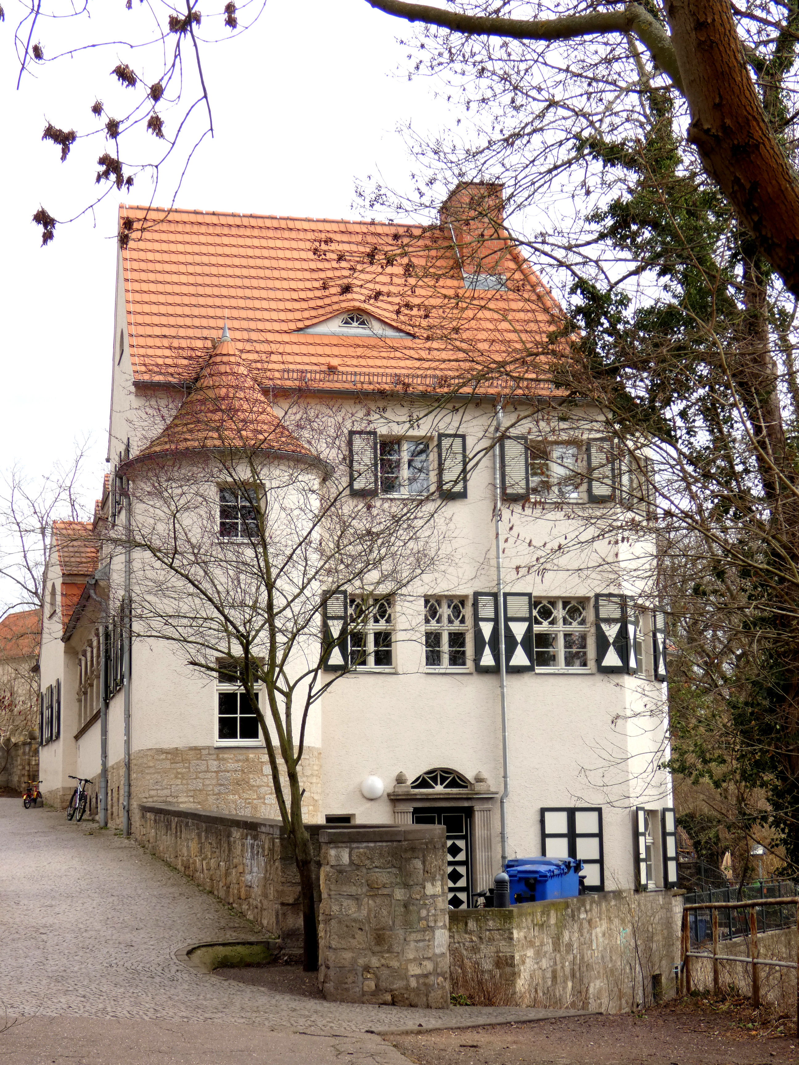 Ehemaliges Säuglingsheim (Emilienheim) der Bethcke-Lehmann-Stiftung, erbaut 1916/1917, Riveufer 8, Halle (Saale)